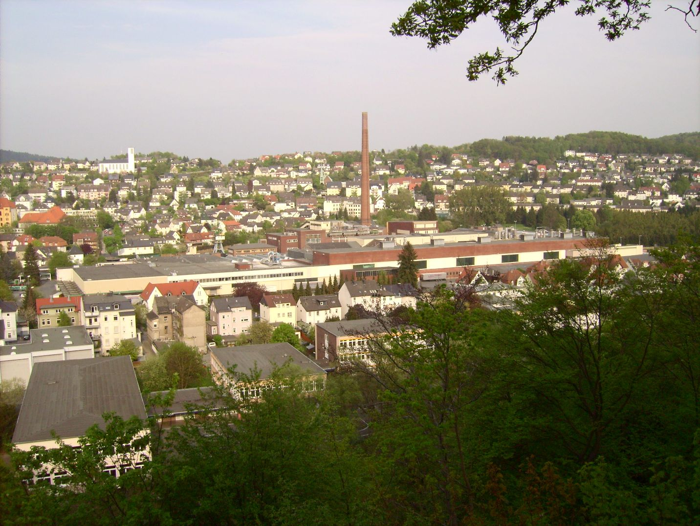 Blick vom Ehmsendenkmal auf Werk Cascades Arnsberg